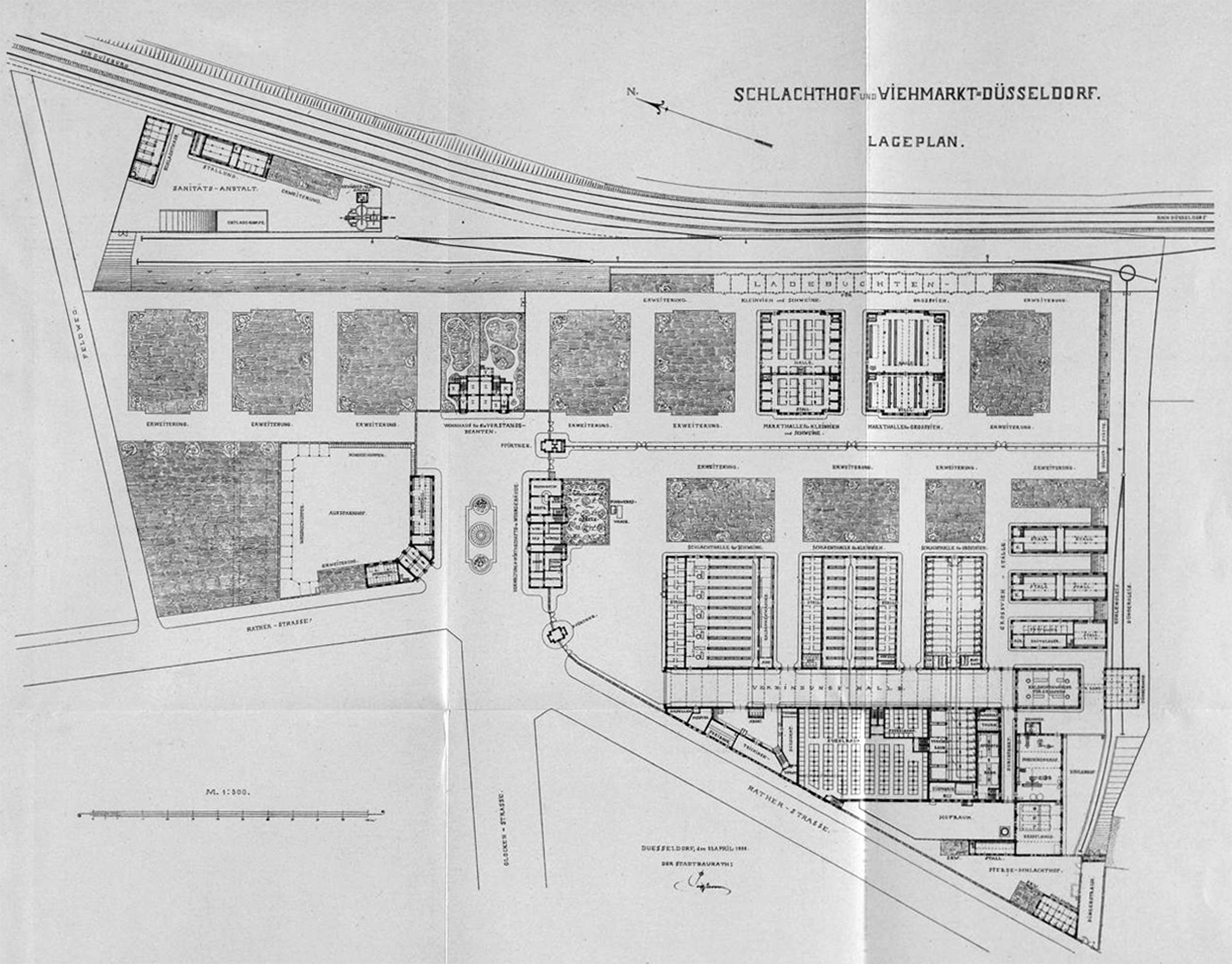 Schlachthof und Viehmarkt Düsseldorf, Lageplan, Düsseldorf, den 27. April 1898, Der Stadtbaurath Carl Peiffhoven